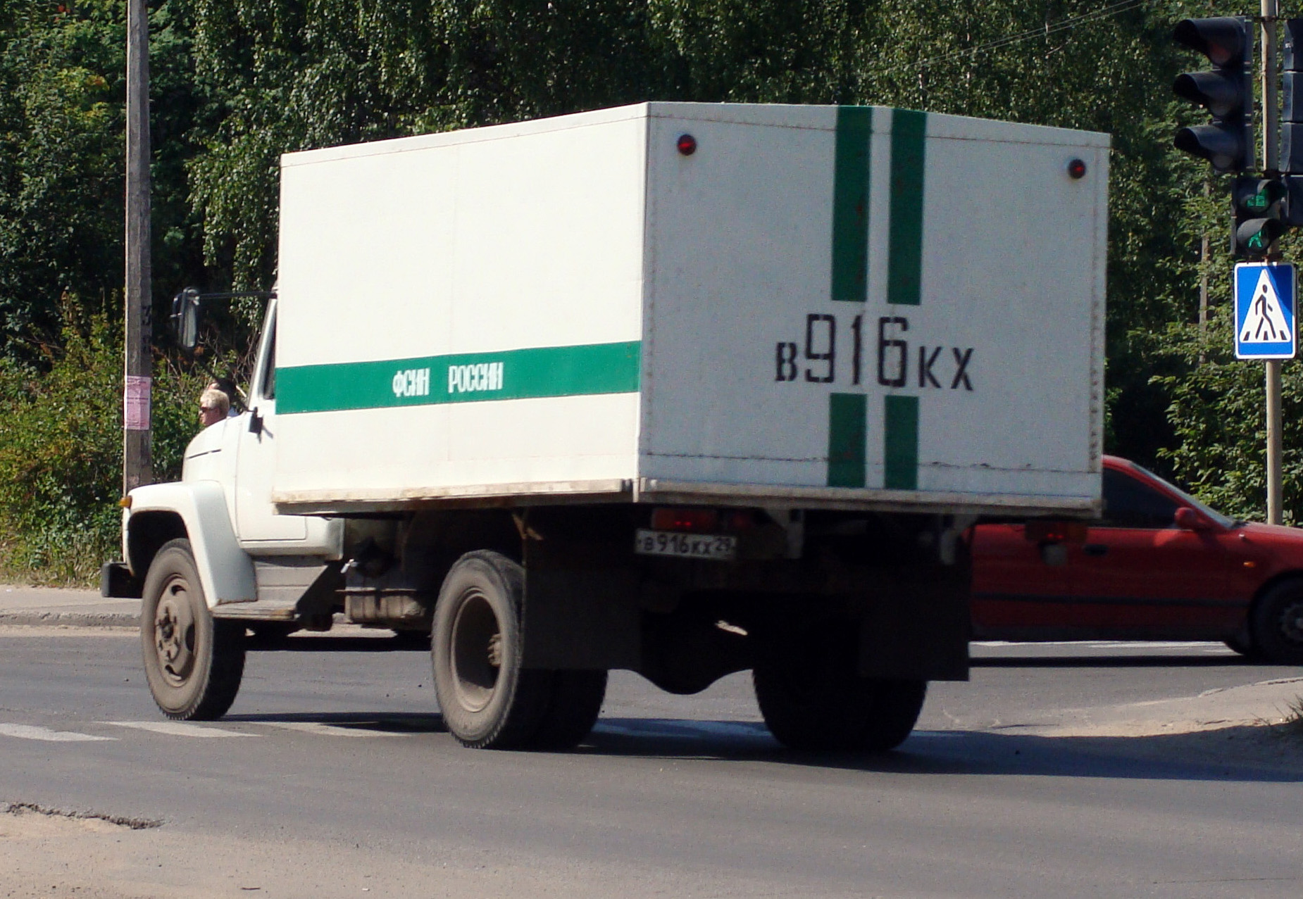 Автомобиль ФСИН России